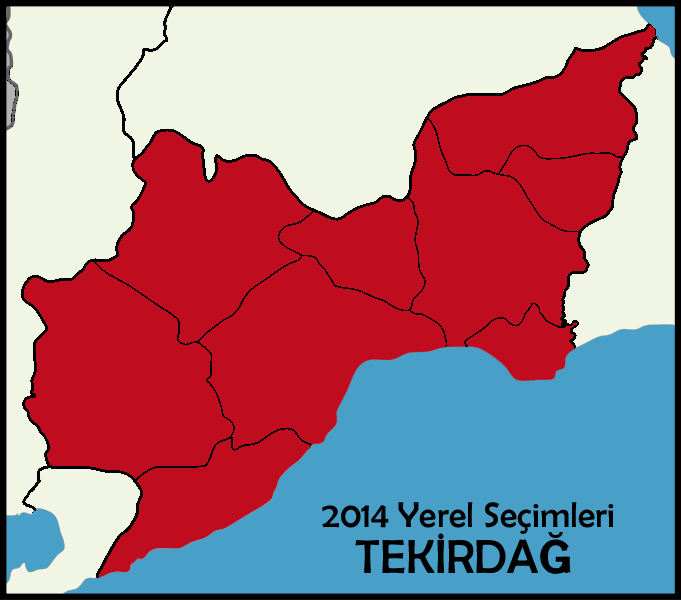 2014 seçim sonuçlarının ilçeler bazındaki bilgisini gösteren dosya.